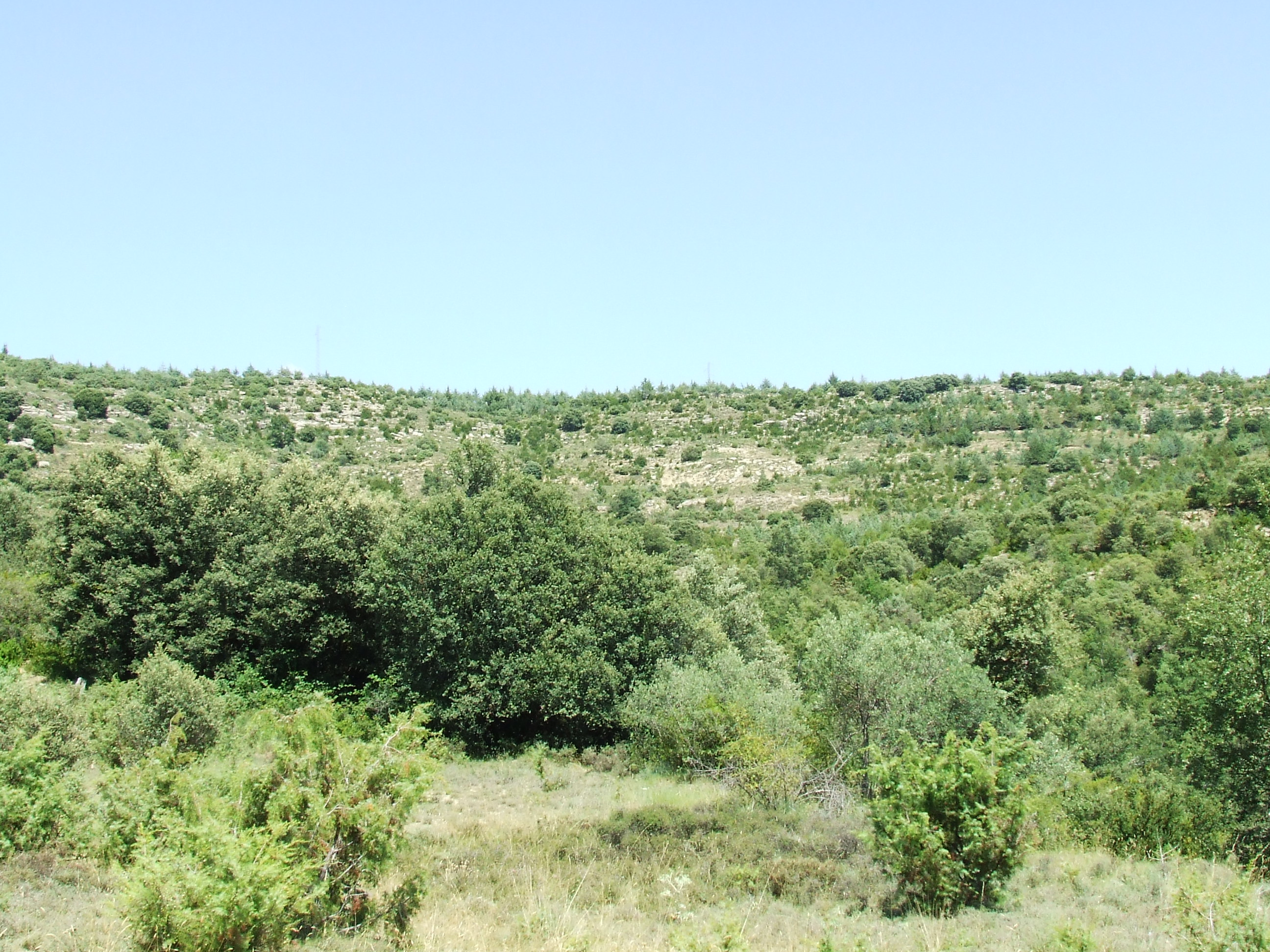 Vedat de la Grisa (Miravet, Mur, Castell de Mur, Pallars Jussà)